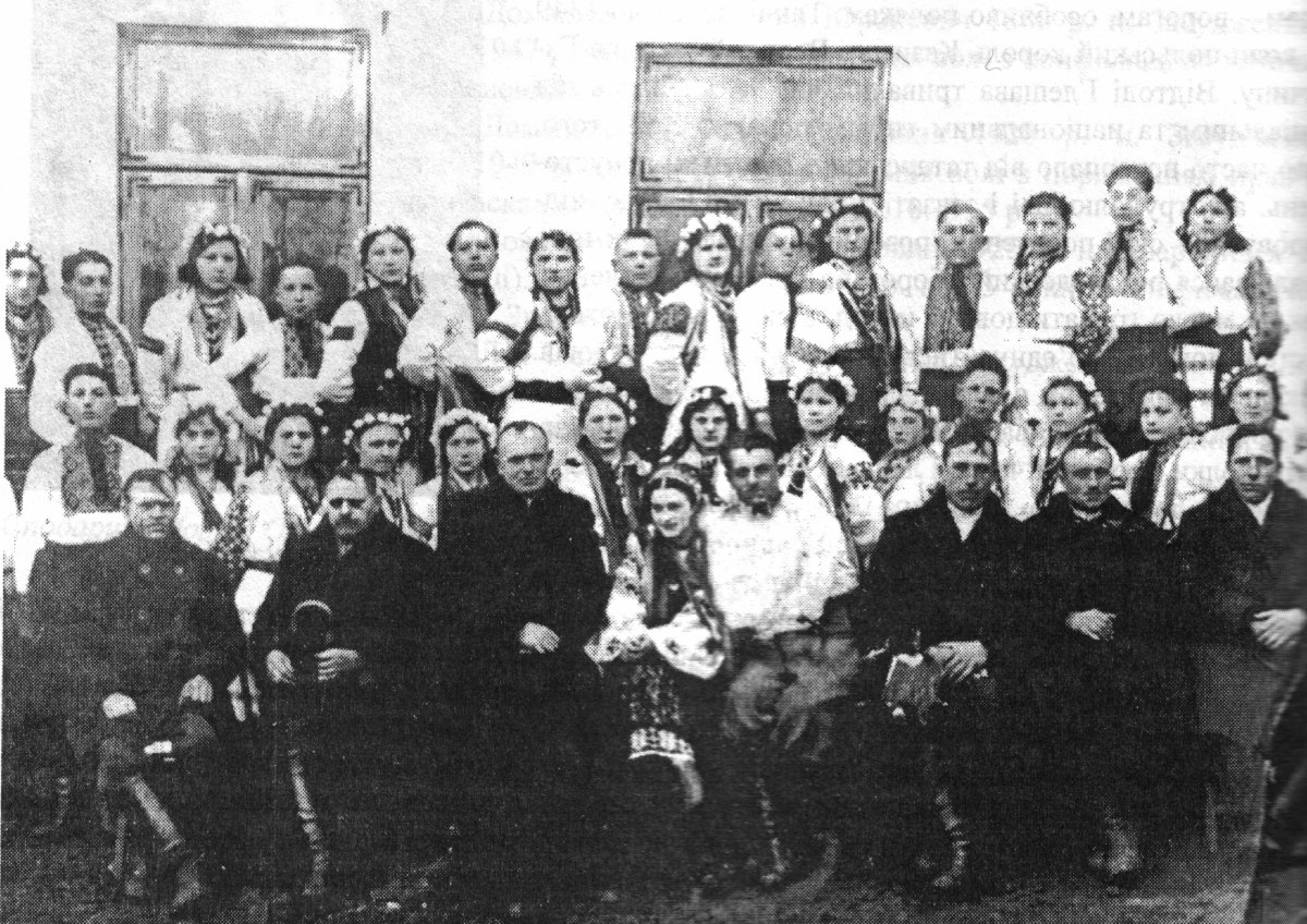 Хор «Просвіти» села Глещави